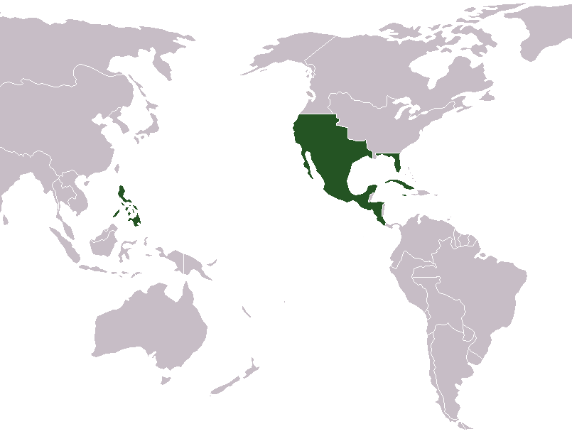 Este archivo fue creado copiando de wikicommons Image:BlankMap-World.png y luego editado en el programa paint. fue hecho por y a la hora--Mexicano 18:35 23 abr 2006 (CEST)